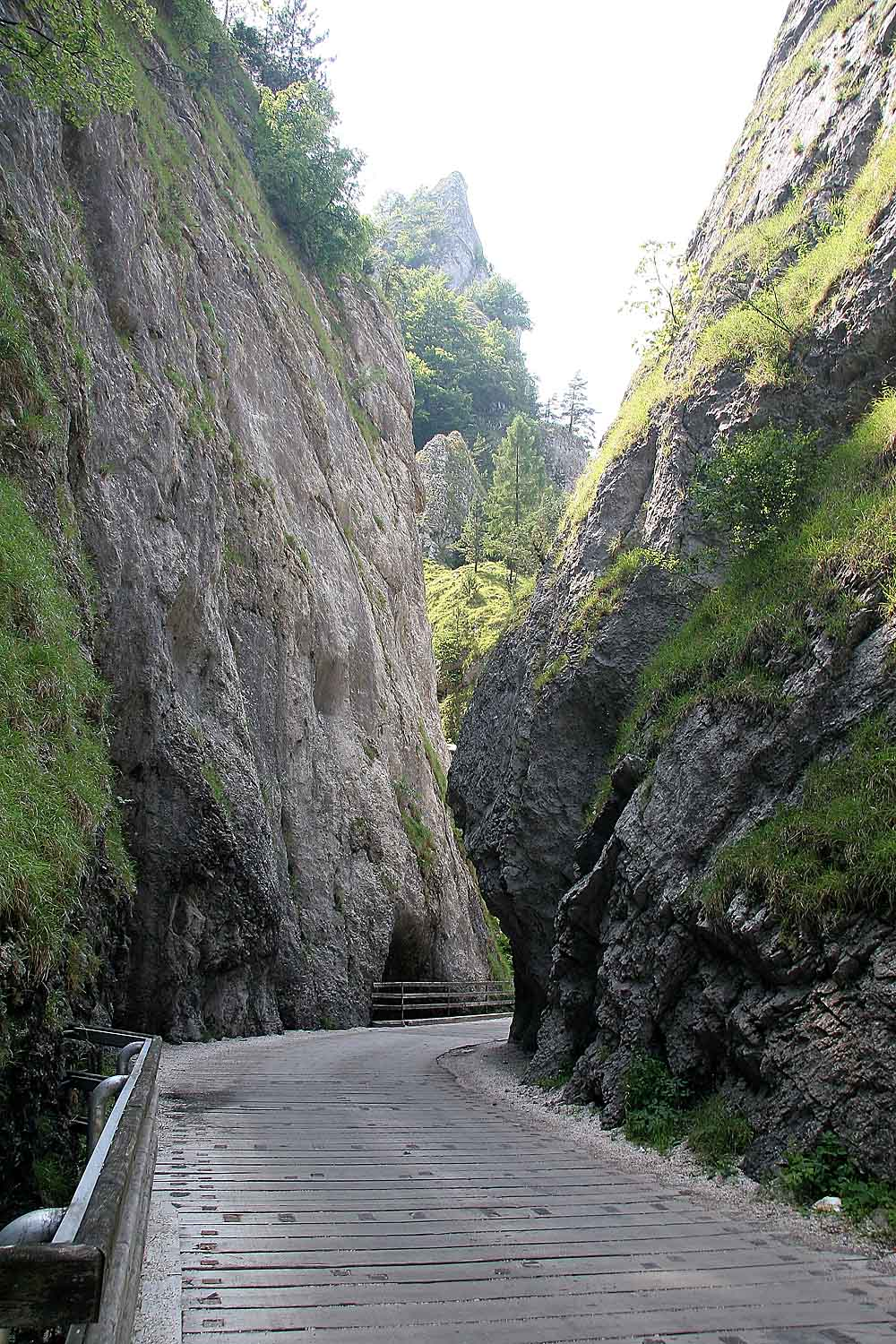 Manínská tiesňava, Súlovské vrchy, district Povážská Bystrica, Slovakia autor:Prazak Date: 27. 6. 2006